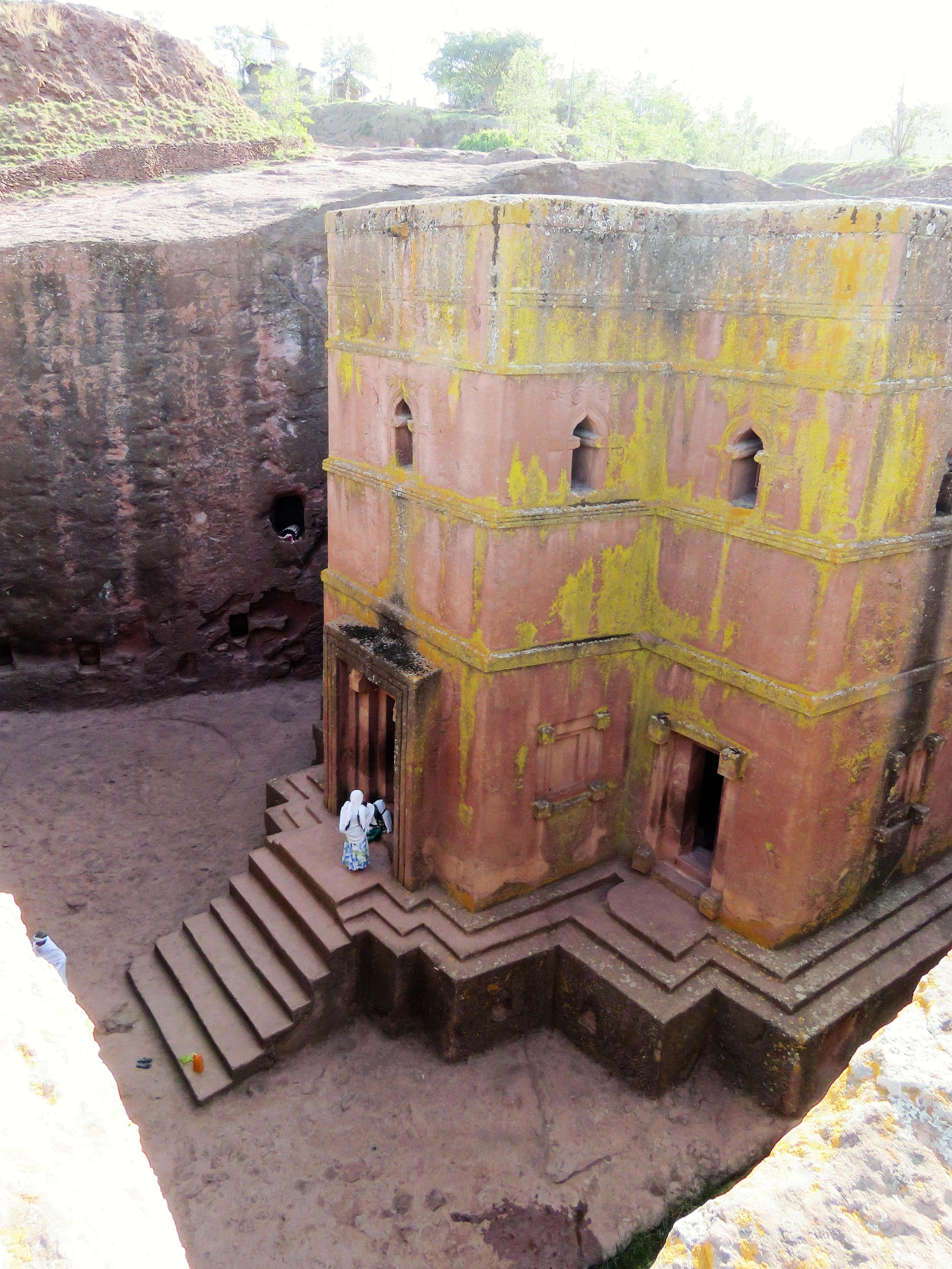 Lalibela Bet Giyorgis 19